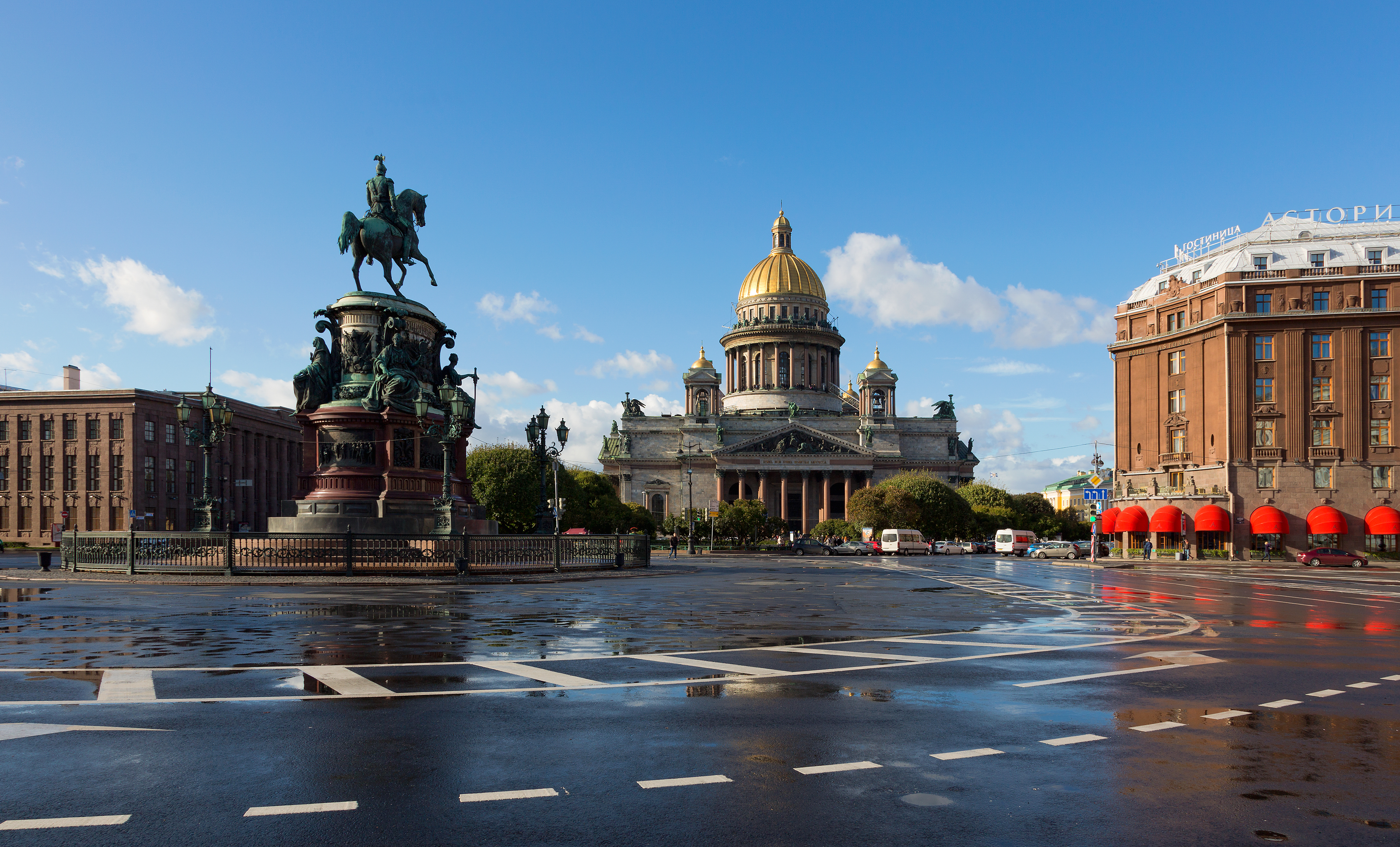 Собор Исаакиевский (Санкт-Петербург и Лен.область, Санкт-Петербург, Исаакиевская площадь)